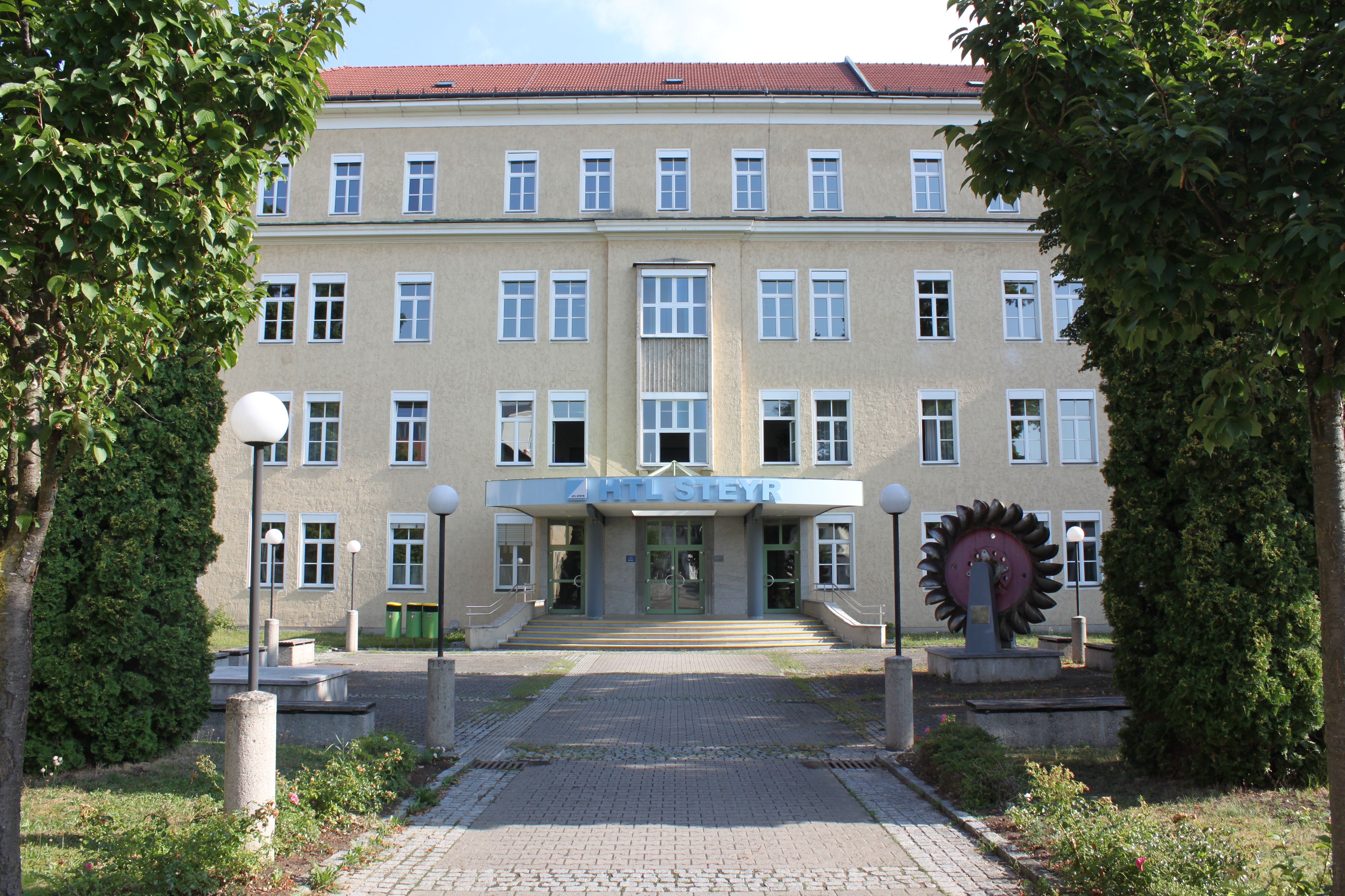 Hauptportalfront der HTL Steyr